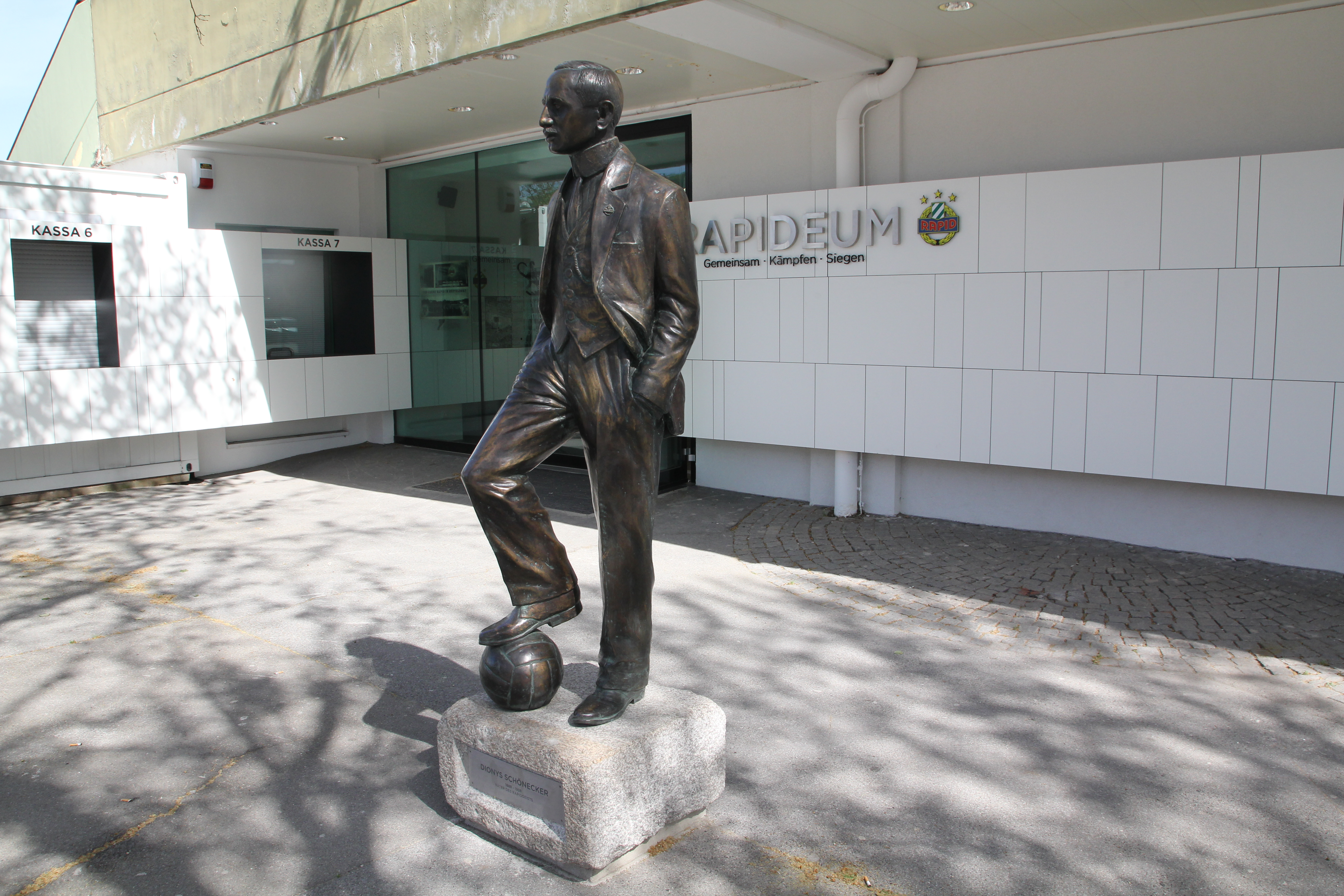 Bronze-Statue von Dionys Schönecker vor dem "Rapideum".